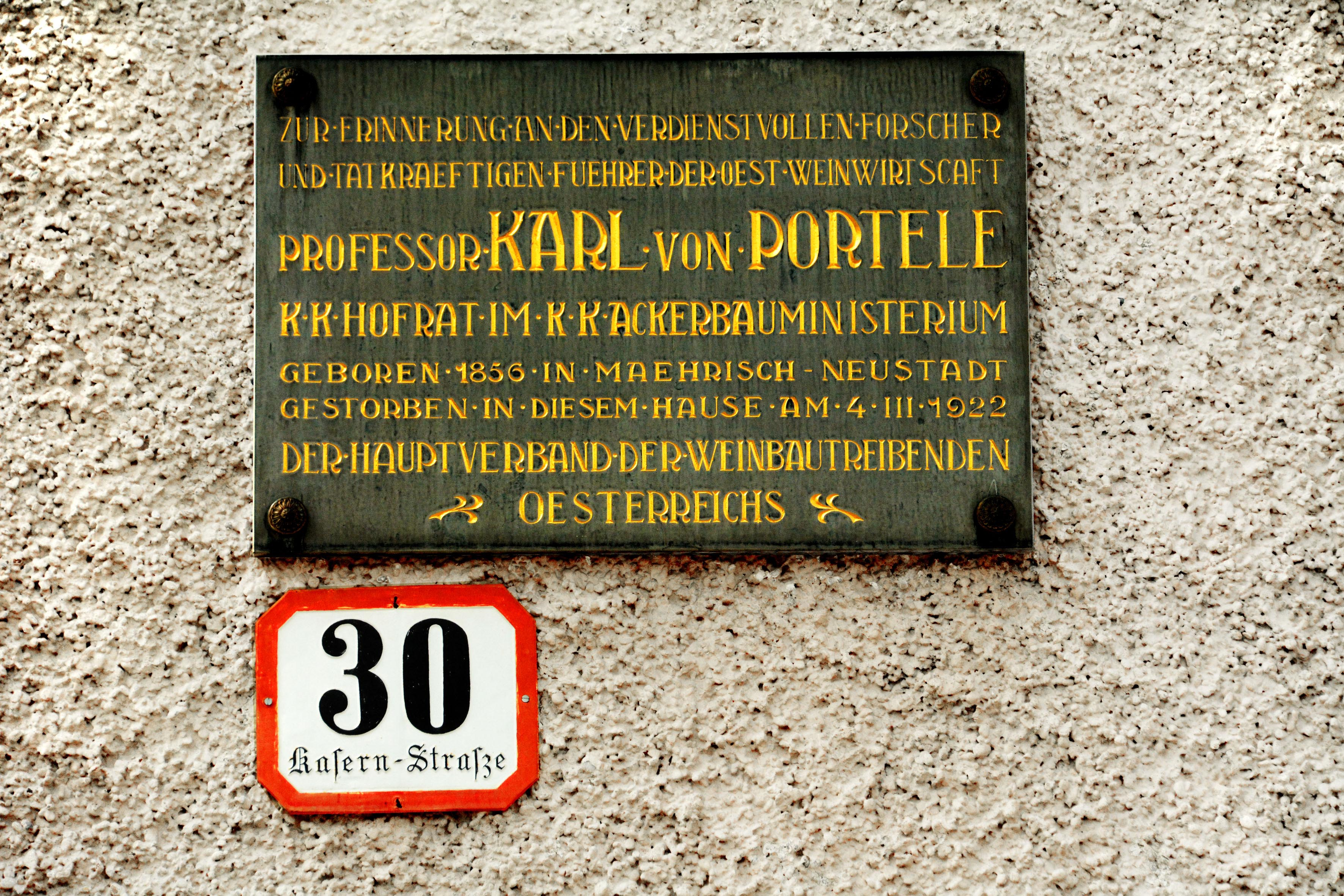 Karl von Portele, Prof.,k.u.k. Hofrat (* 30. Juli 1856 in Mährisch-Neustadt; † 4. März 1922 in Krems an der Donau), war ein österreichischer Önologe. Rettete im Ersten Weltkrieg den Weinbau in Österreich durch die Bekämpfung der Peronospora (Falsche Mehltau, eine Pflanzenkrankheit bei Weinreben). Die Gedenktafel befindet sich in der Kasern-Straße Nr.30, 3500 Krems an der Donau, Niederösterreich.